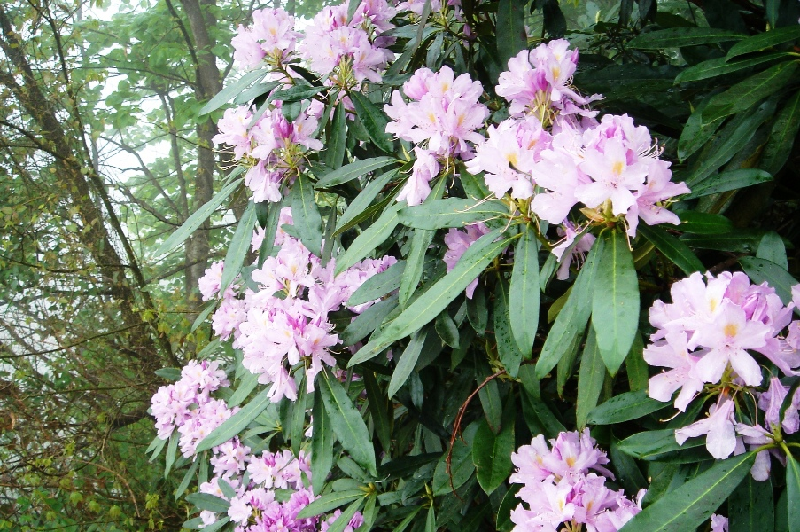 Rhododendron ponticum